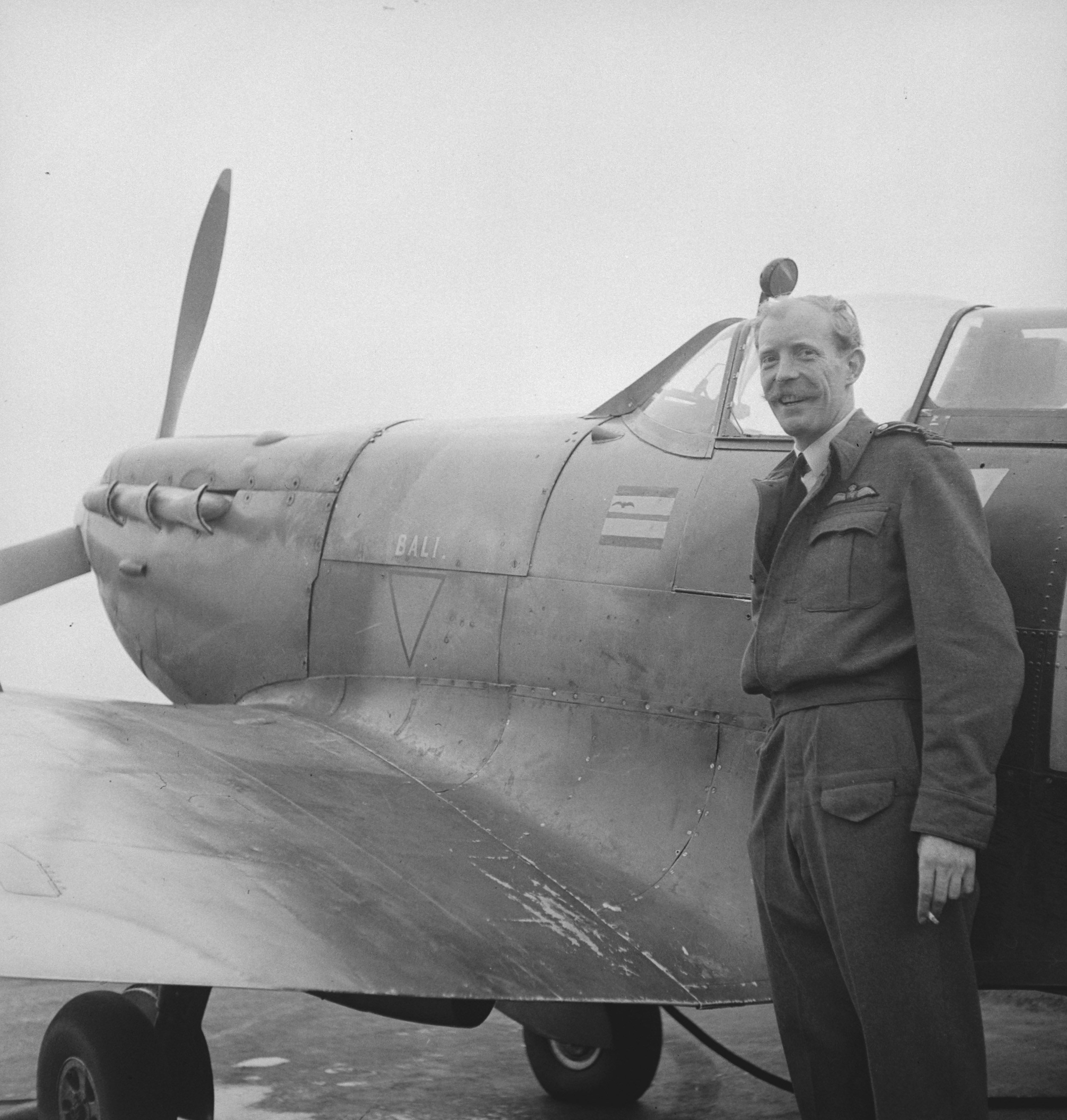 Collectie / Archief : Fotocollectie Anefo Reportage / Serie : 322 (Dutch) squadron RAF Beschrijving : Bijschrift "The squadronleader, a British pilot-officer" [De squadron leider, een Britse officier-vlieger] Annotatie : Betreft S/Ldr. A.C. Stewart [commandant juni-augustus 1943] Datum : augustus 1943 Locatie : Groot-Brittannië Trefwoorden : luchtmacht, tweede wereldoorlog, vliegers Fotograaf : [onbekend] Auteursrechthebbende : Nationaal Archief Materiaalsoort : Negatief (zwart/wit) Nummer archiefinventaris : bekijk toegang 2.24.01.03 Bestanddeelnummer : 934-8780